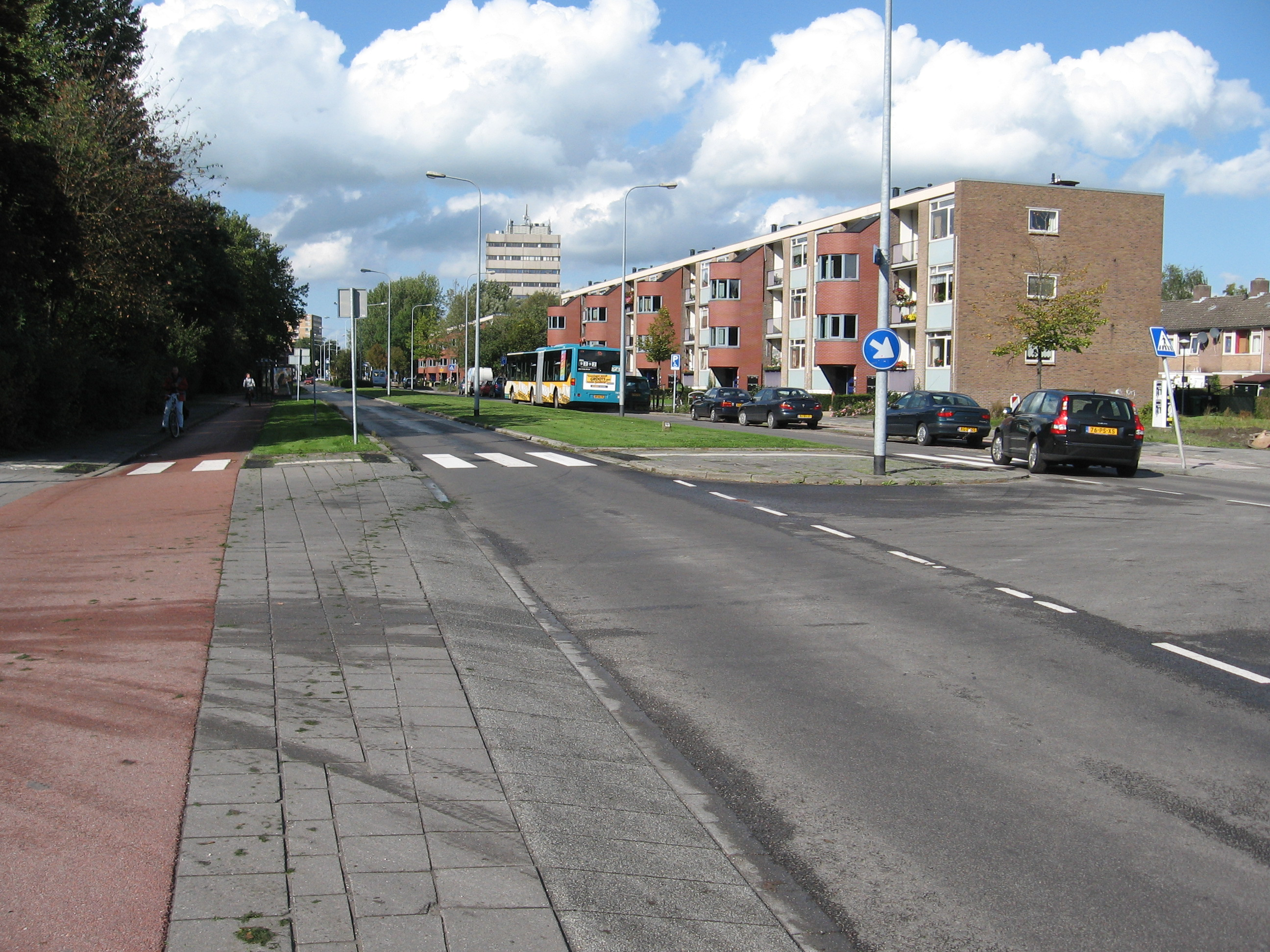 De Zonnelaan in de wijk Paddepoel in Groningen.